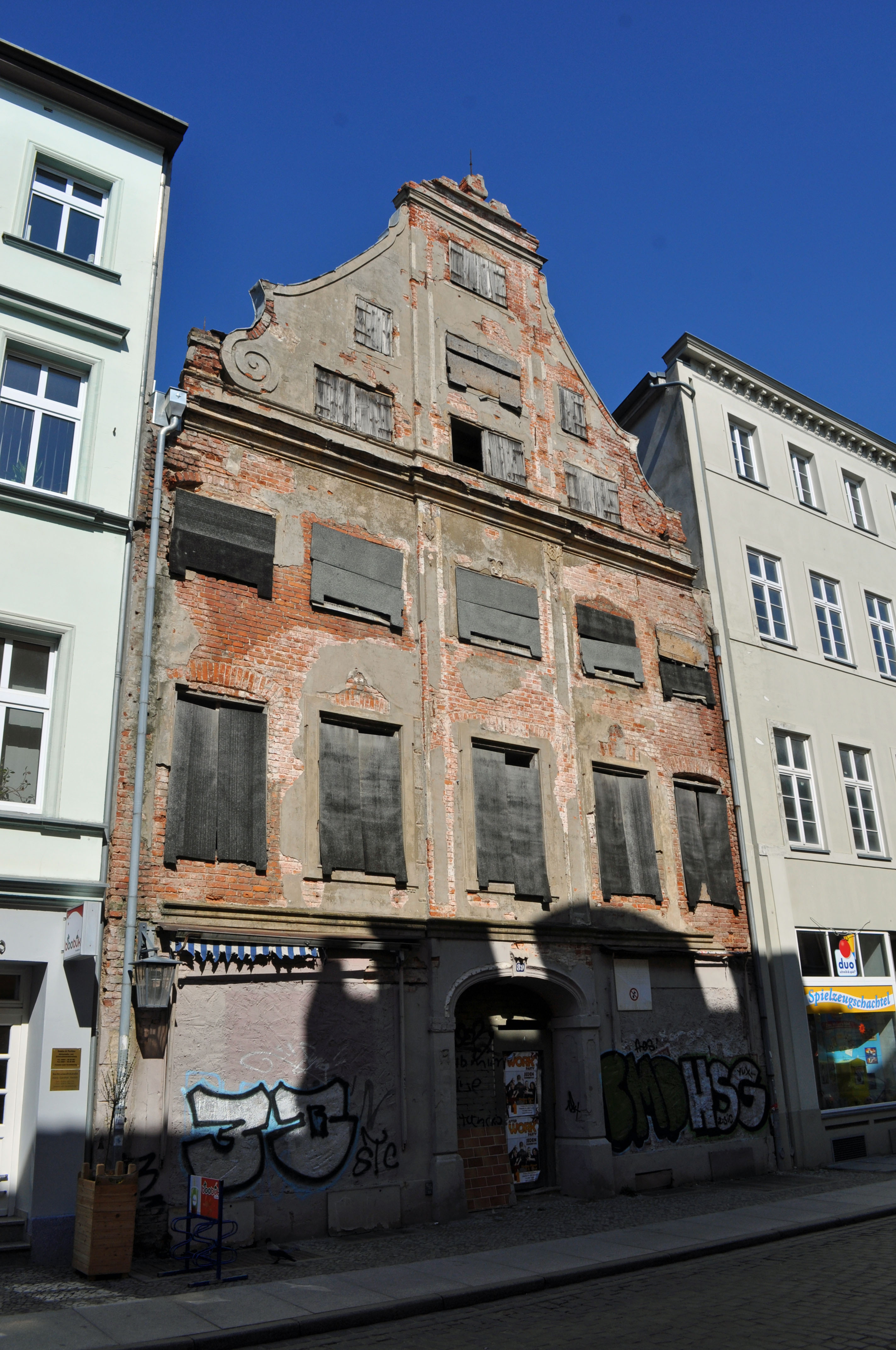 Gebäude bzw. Gebäudedetail in Stralsund. Straße und Hausnummer siehe Dateiname.